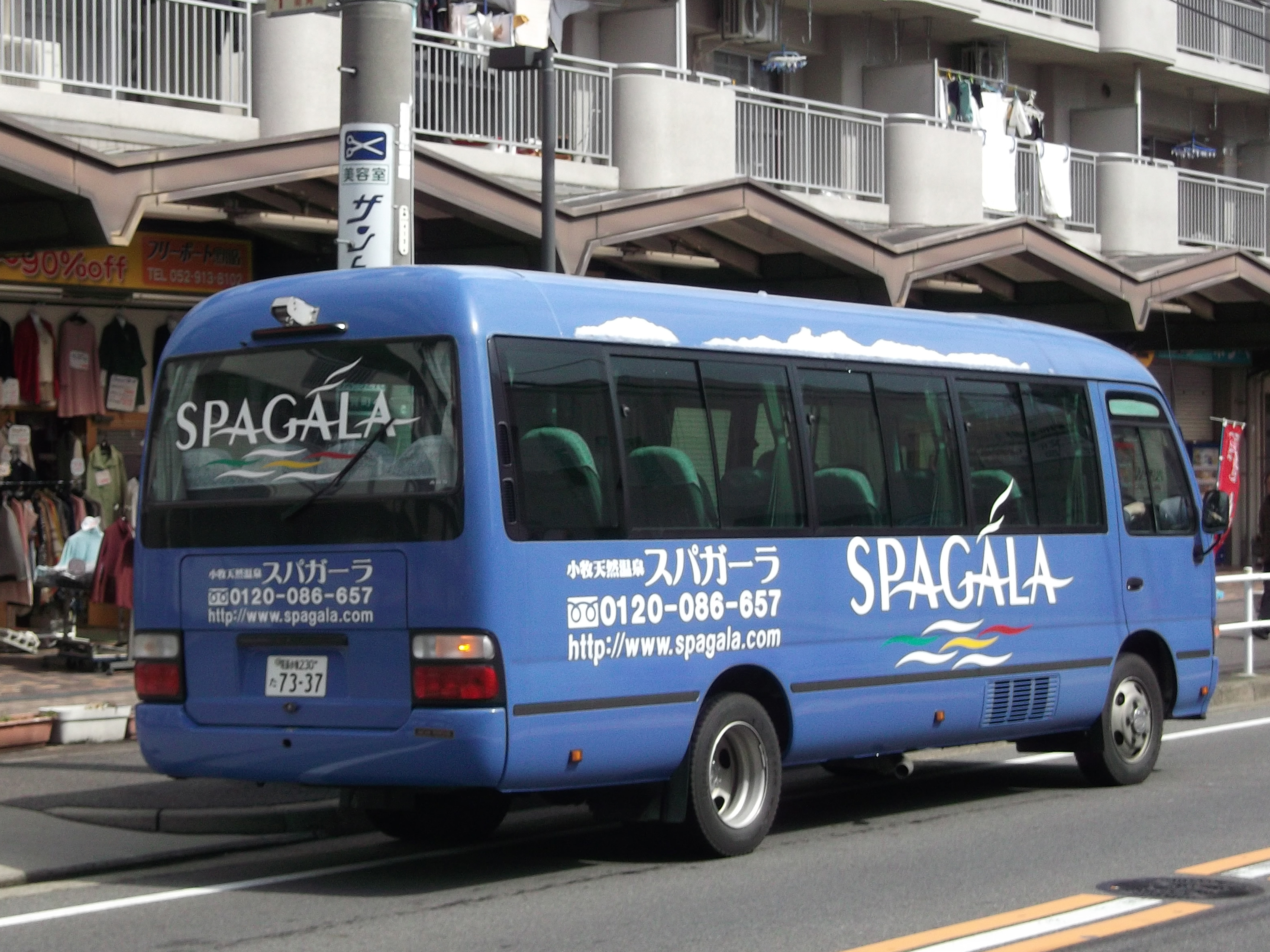 小牧天然温泉スパガーラの無料送迎バス